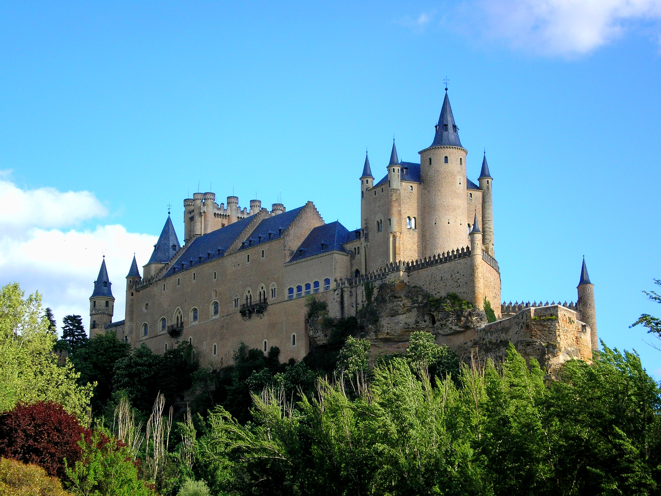 Alcazar de Segovia